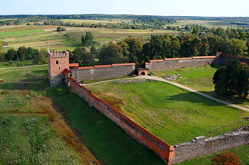 Medininkų pilies vaizdai iš dangaus